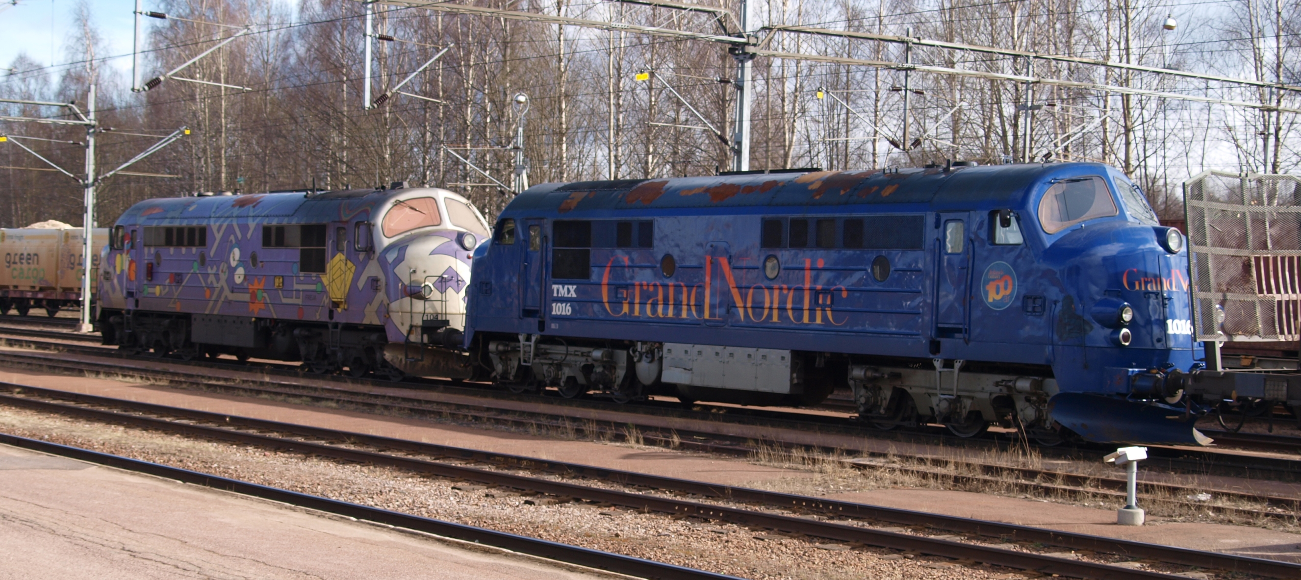 Zwei Lokomotiven der Baureihe TMX in Mora, Schweden